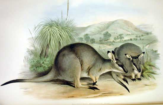 Macropus irma (ex: Halmaturus manicatus)